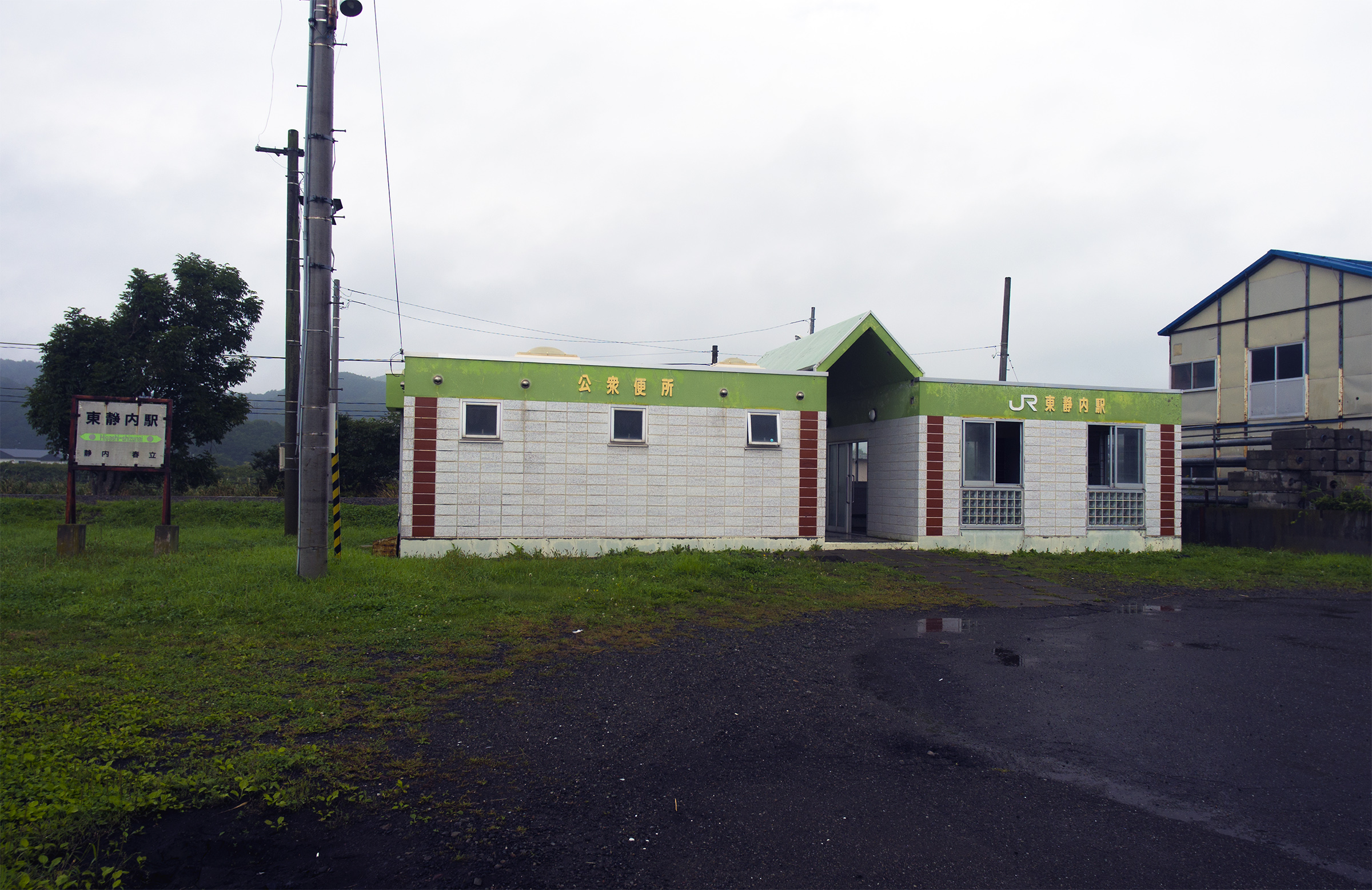 北海道旅客鉄道日高本線東静内駅駅舎